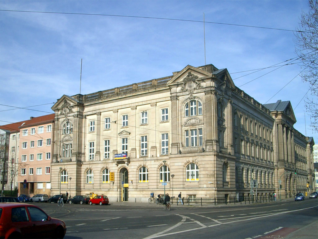 Neobarockes Postgebäude in Potsdam am Platz der Einheit. (Postoffice in Potsdam, Germany)